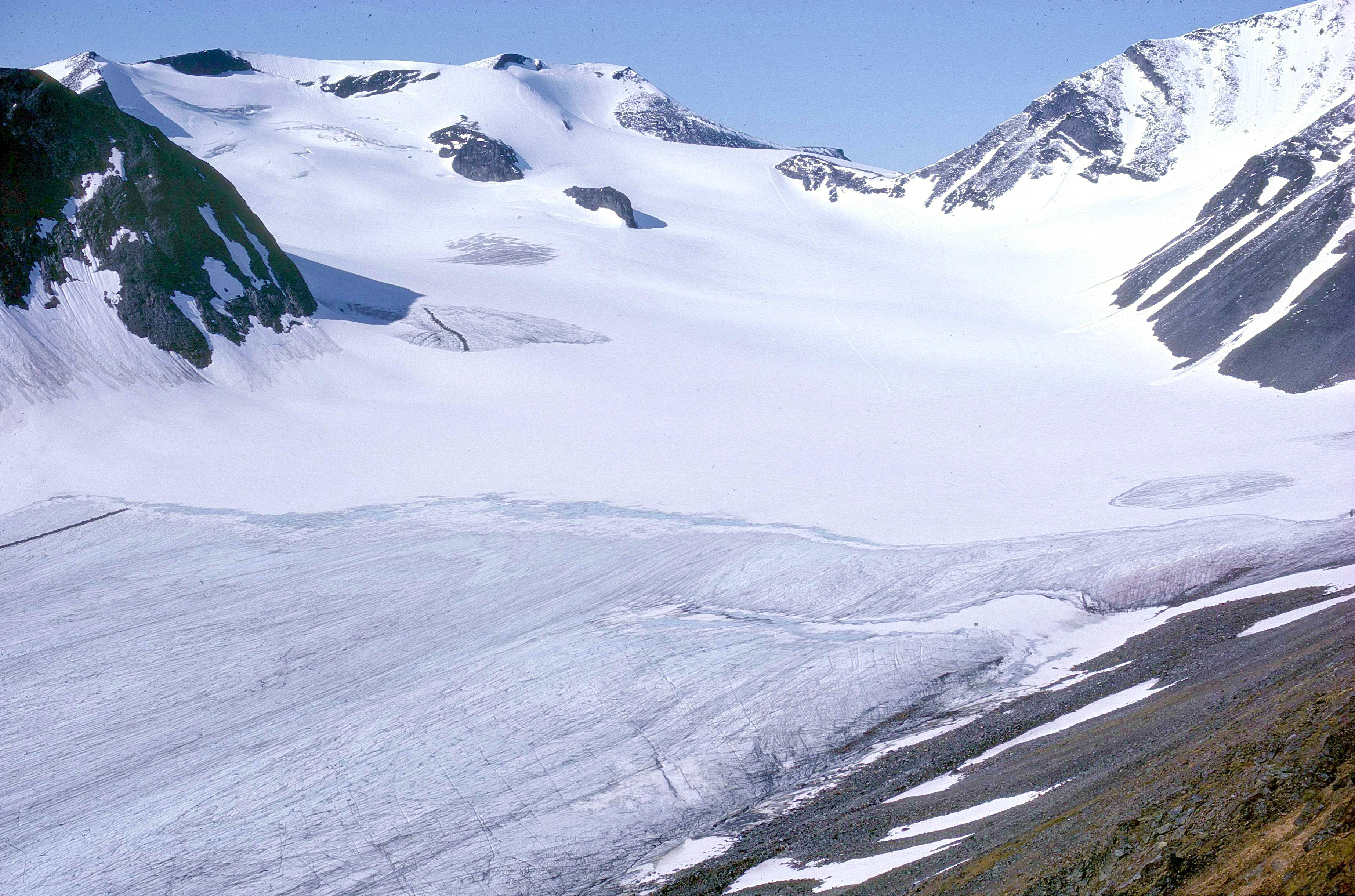 övre delen av mikka-glaciären